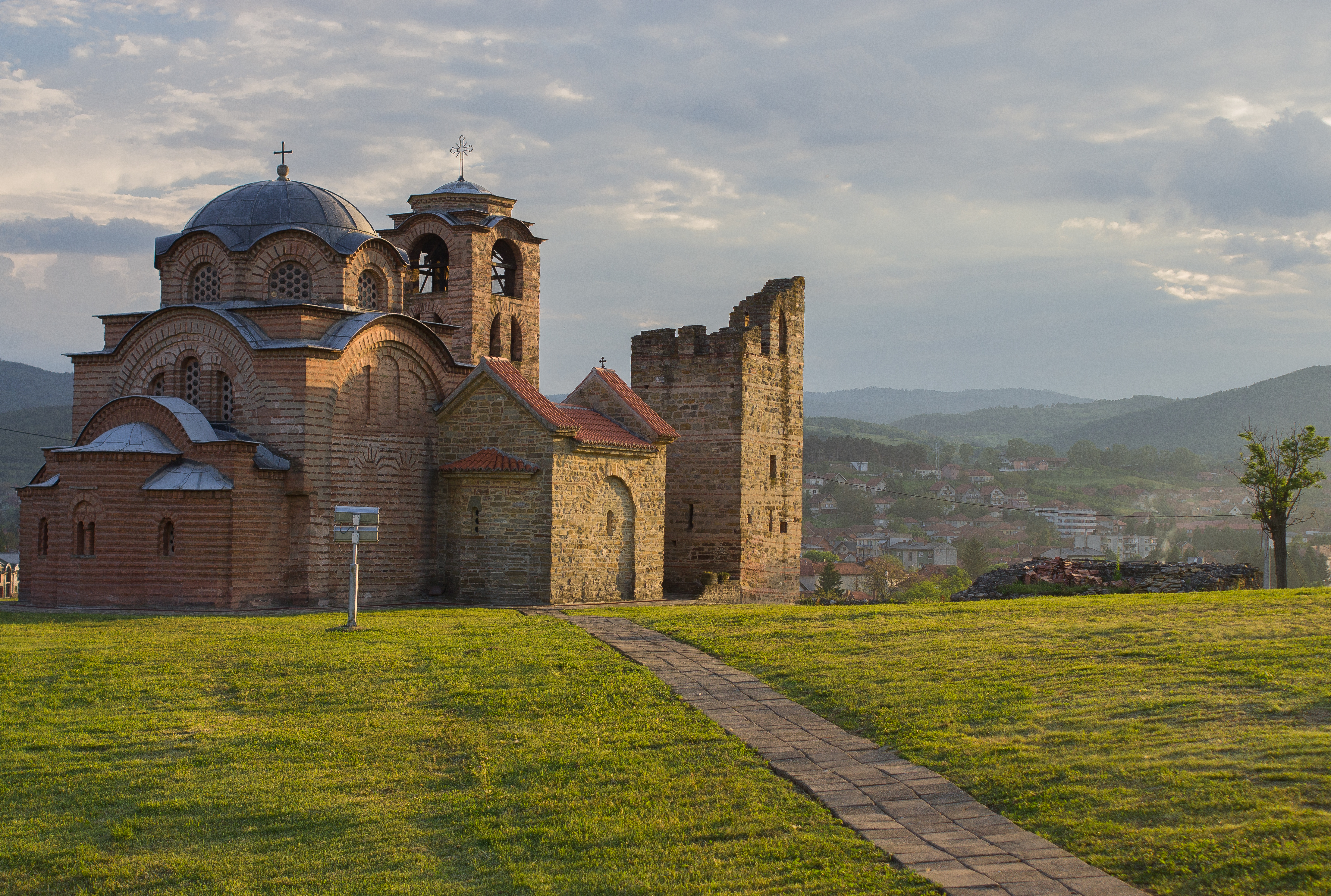 Српски (ћирилица): Ово је фотографија заштићеног природног добра у Србији под шифром: МПС32 This is a a photo of a natural area in Serbia with ID: МПС32 Манастир светог Николе,Куршумлија.Задужжбина Стефана Немање.